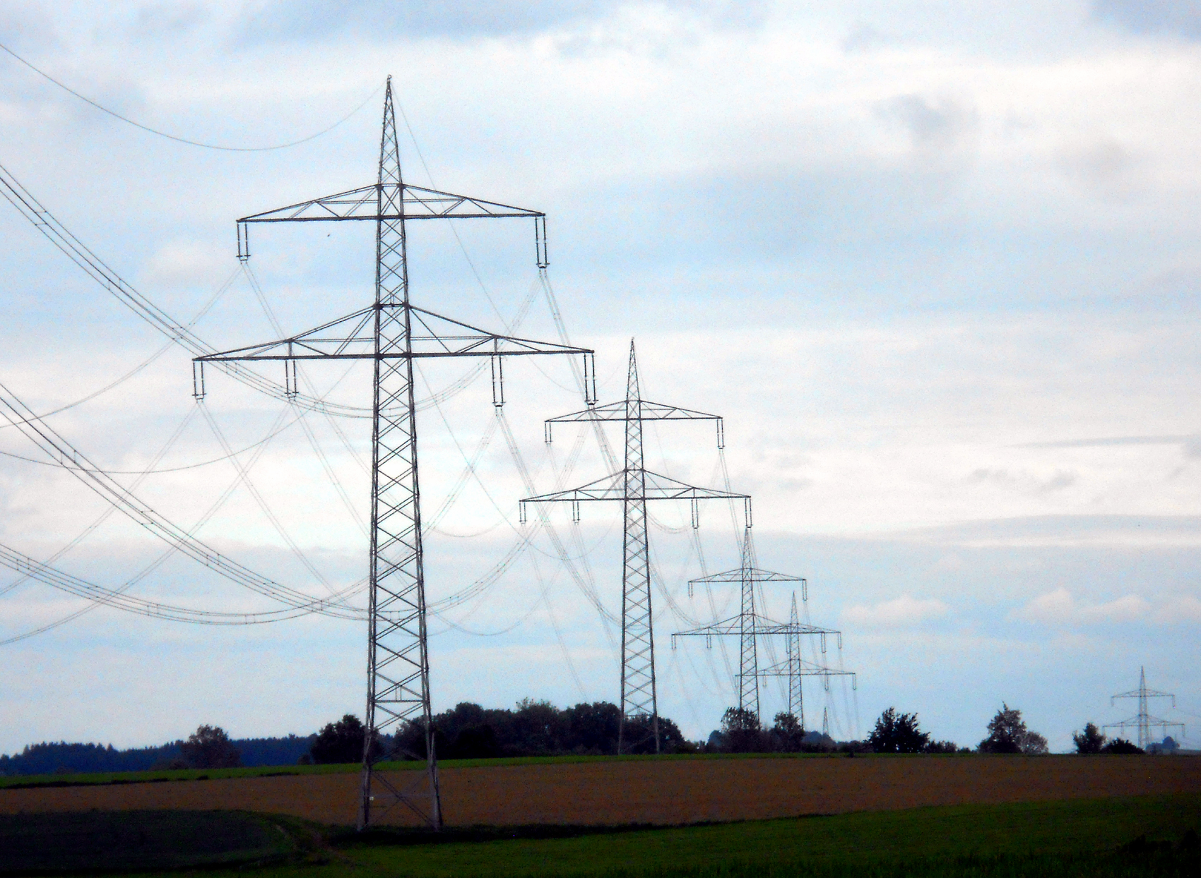 Stromtrasse, Deutschland